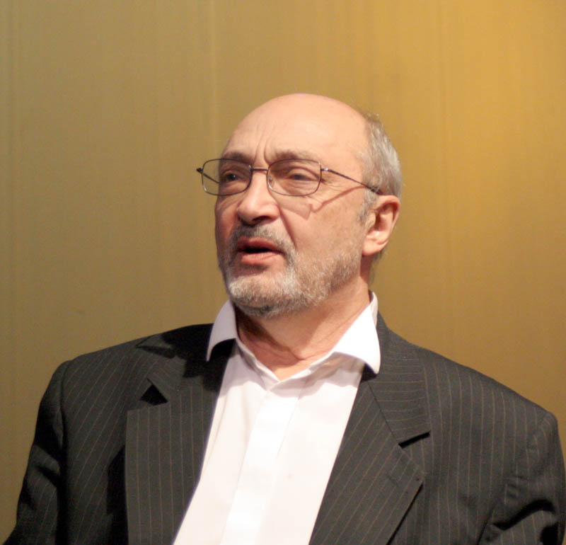 Актёр Михаил Козаков во время выступления в Саратове, в театре кукол «Теремок»